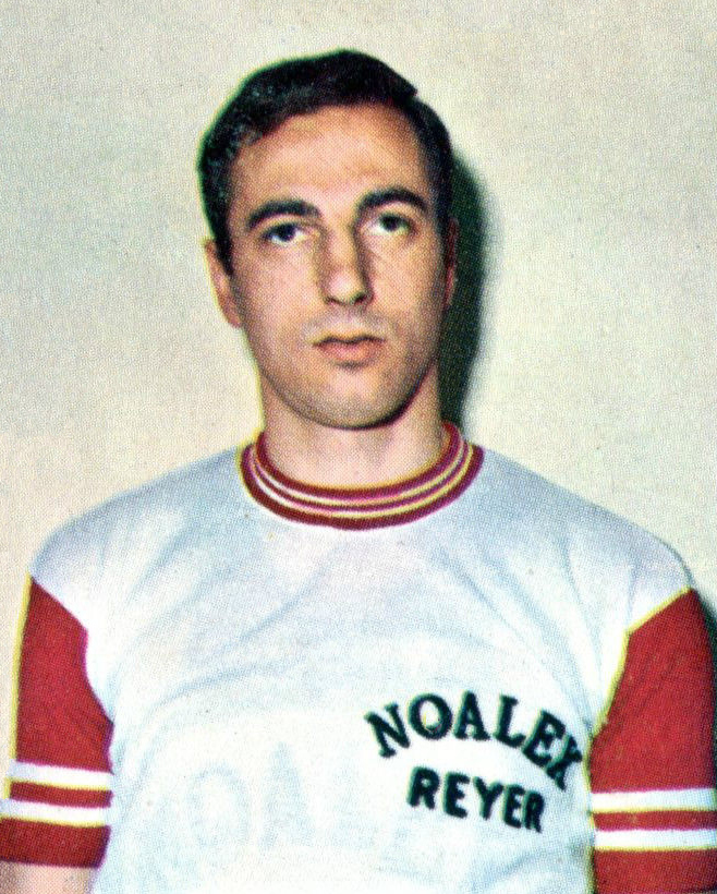 Figurina/Sticker CAMPIONI DELLO SPORT 1968/69 - n. 268 - G. VIANELLO -ITA-Rec